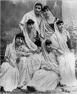 Template:Move to Commons